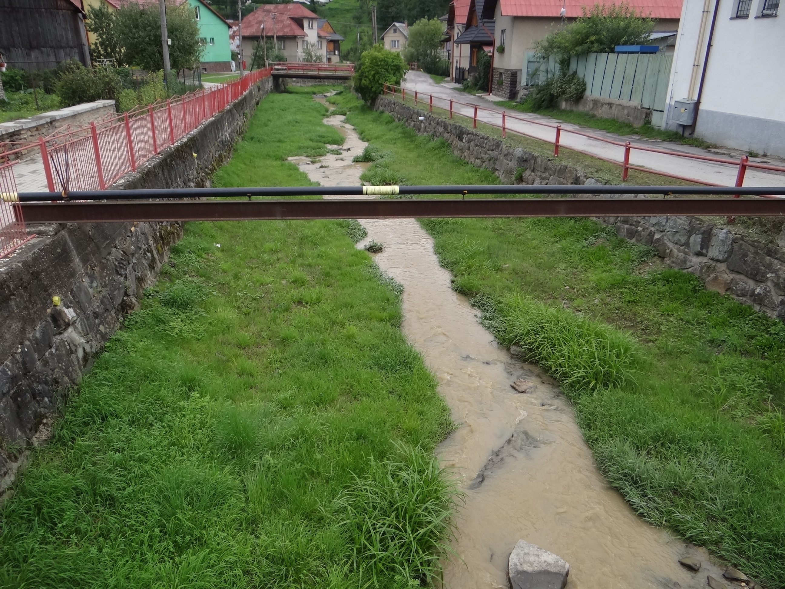 Chlebnice